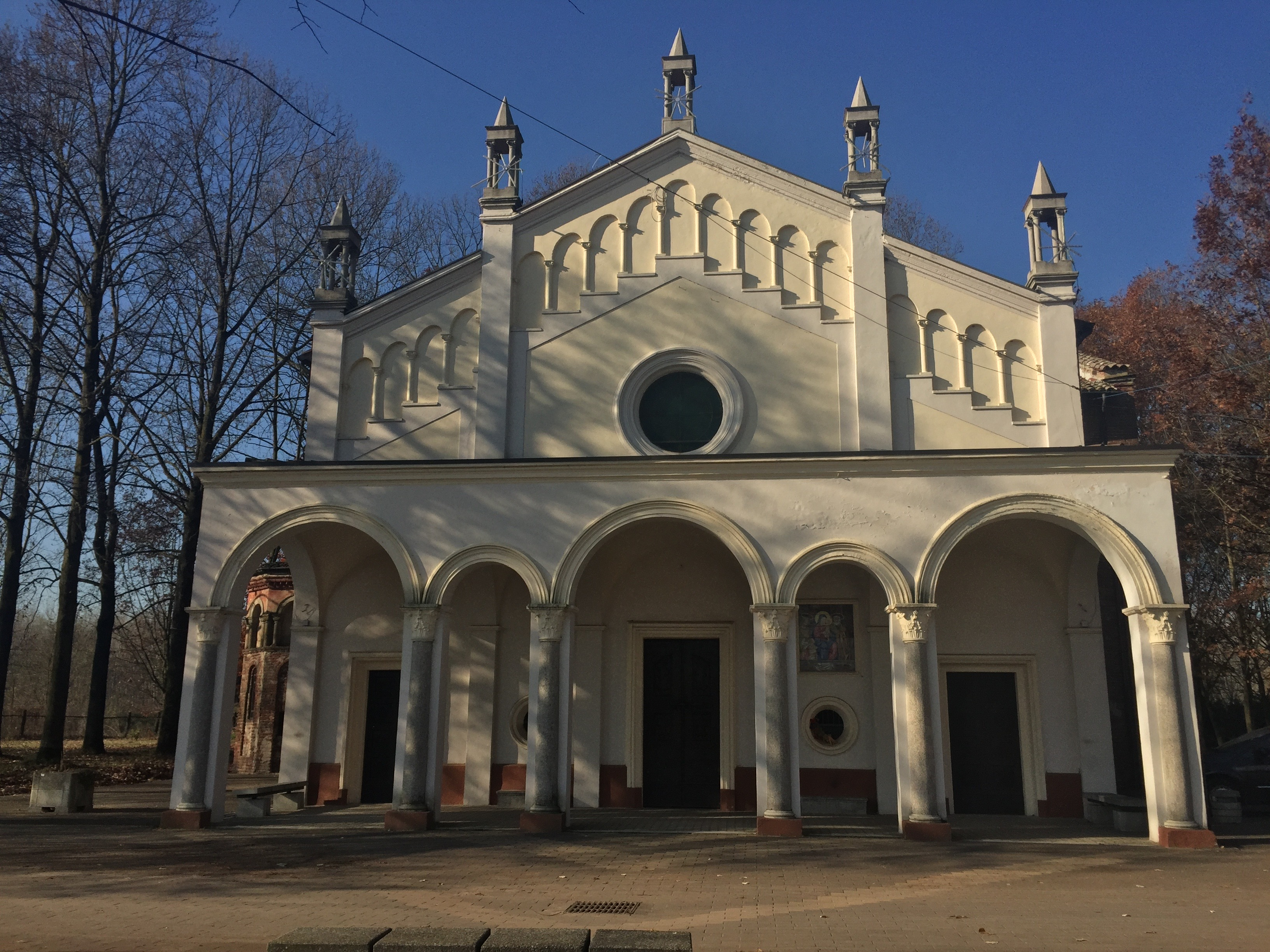 Facciata del santuario di Santa Anna (Cilavegna)